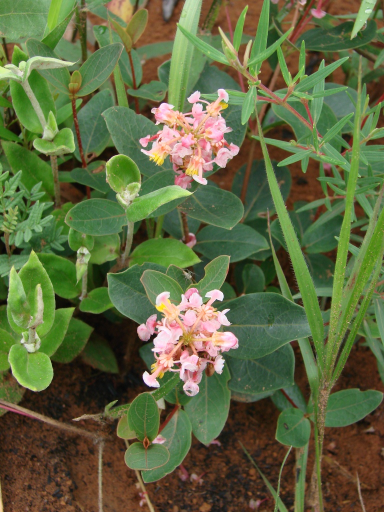 Byrsonima rigida A.Juss. - MALPIGHIACEAE - Jardim Botânico de Brasília - Brasília - Distrito Federal - Brasil.